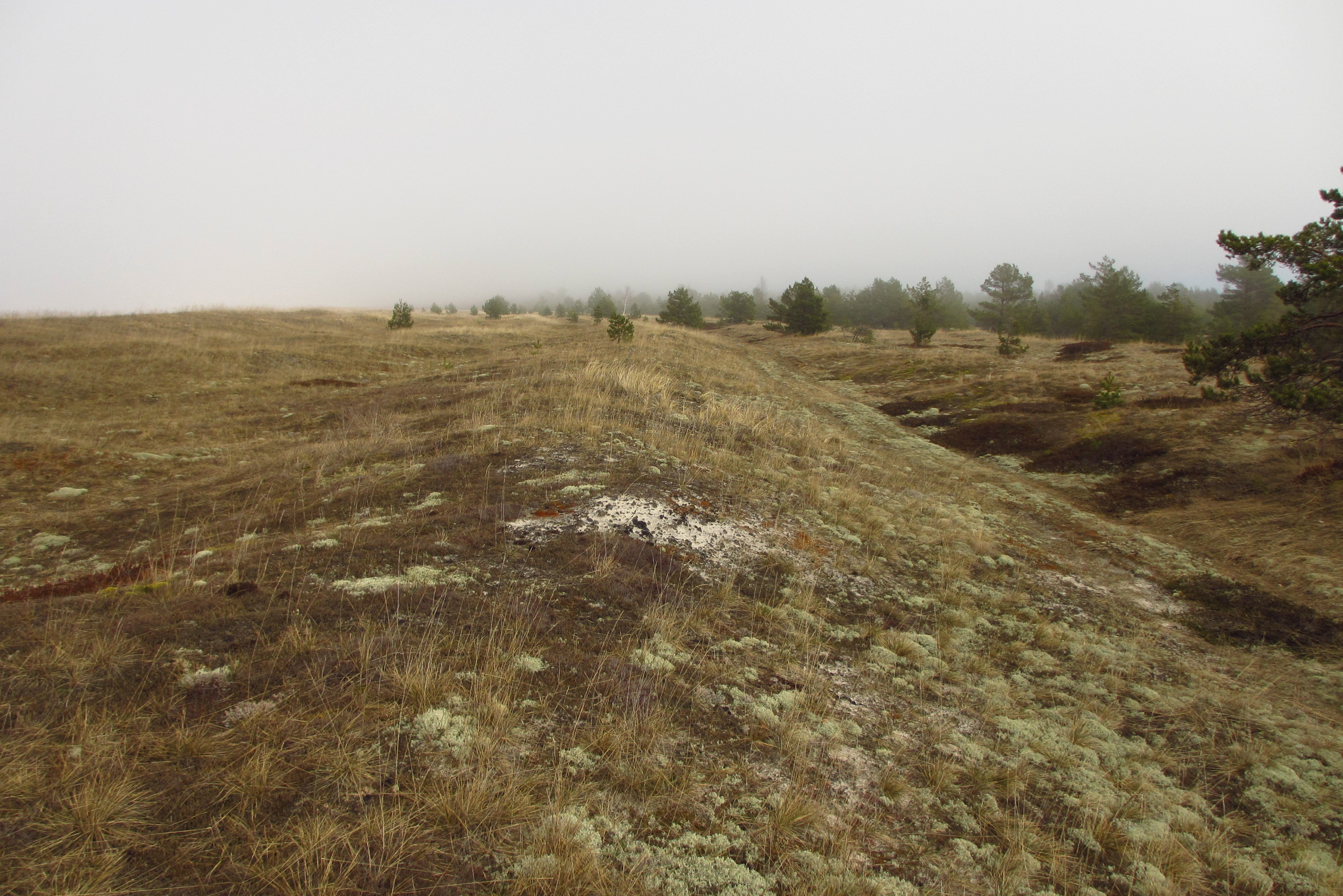 Keibu luited, Nõva MKA